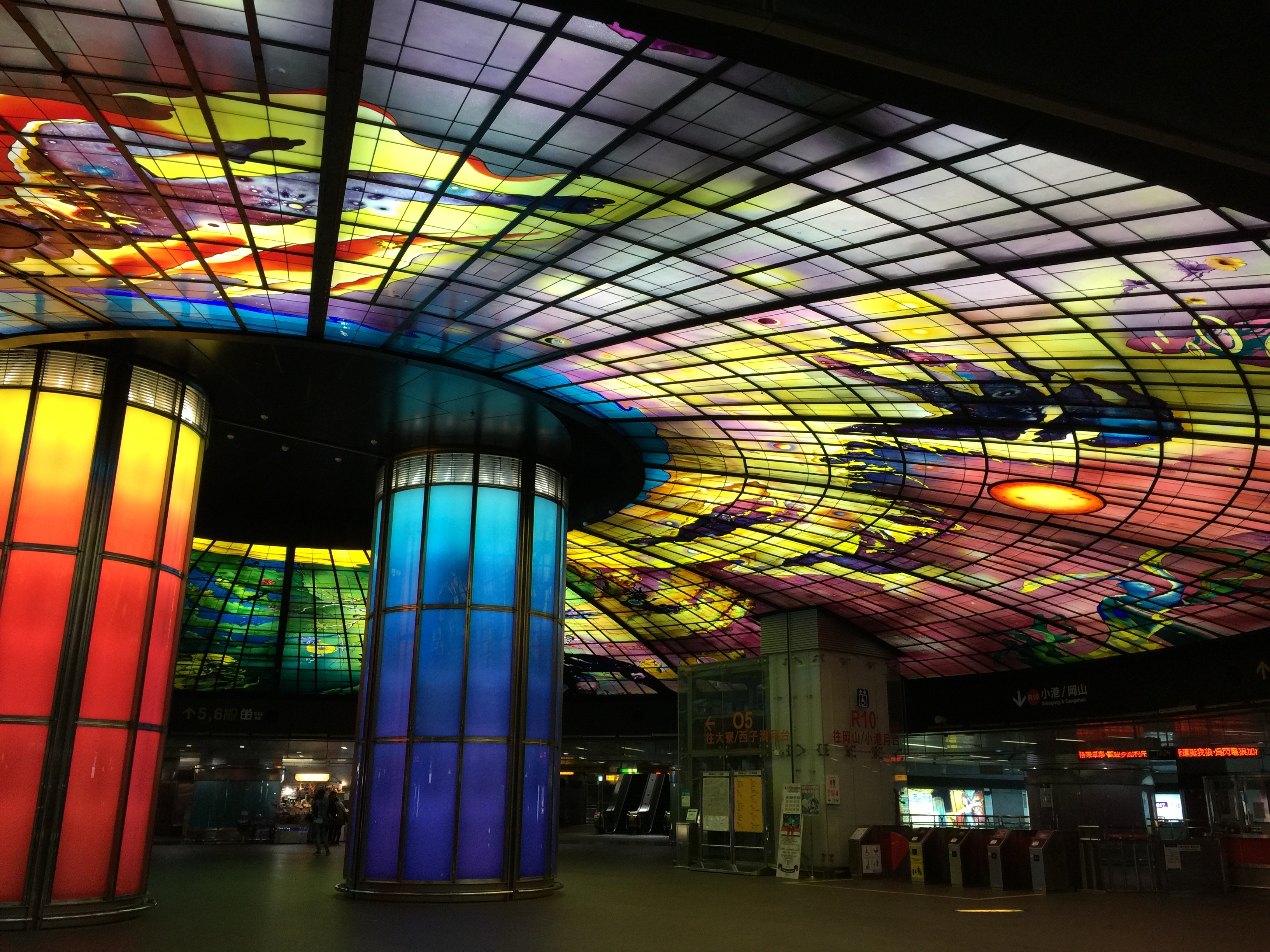 Lichtdom